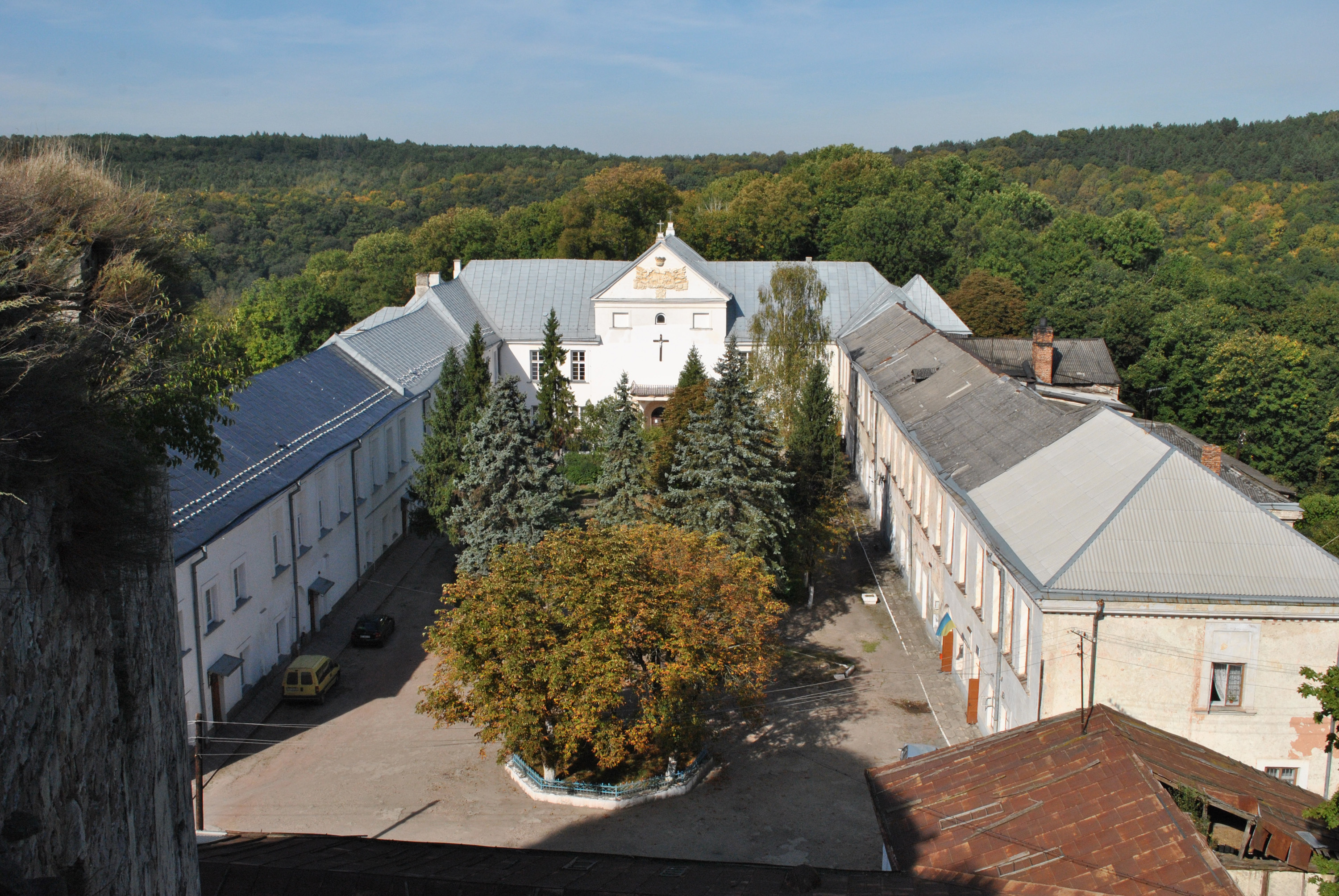 Палац XVII-XVIII ст. (мур.) у селі Язловець Бучацького району Тернопільської області. Вид на палац із замку.